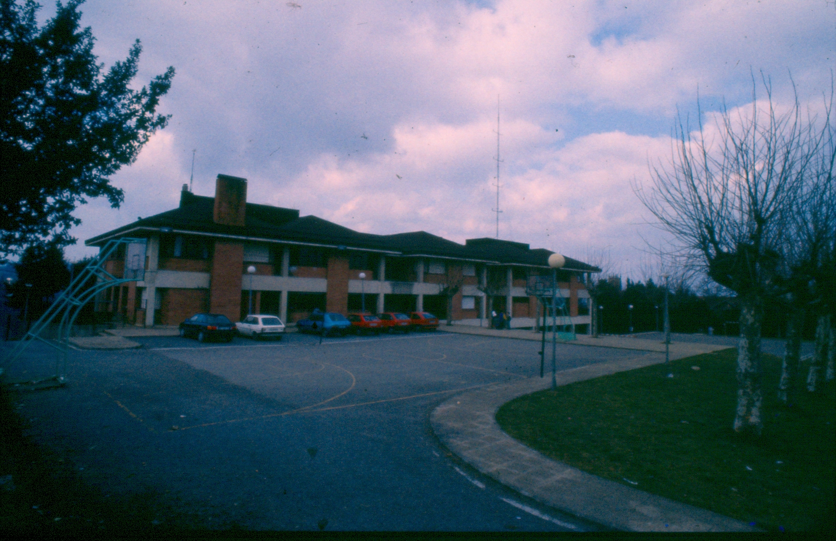 Ikastola Ikasbide (San Sebastián) edificio Alkano en al Alto de Zorroaga